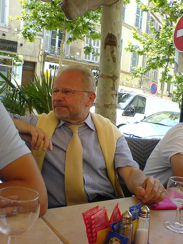 Repas parlementaire à Salon de Provence en 2007 pendant les élections.